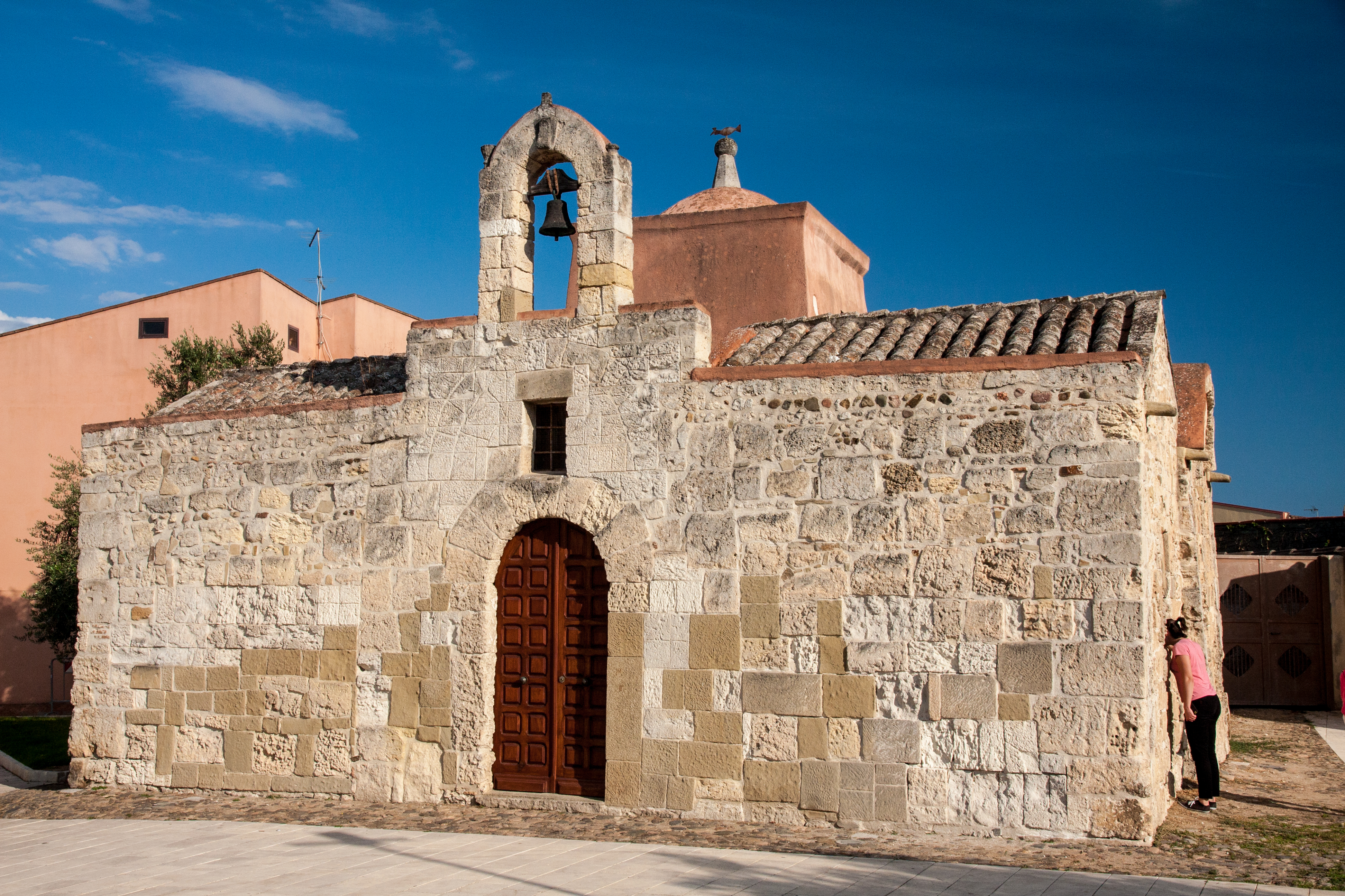 Kirche San Giovanni, ca. 1000 nacj Christus